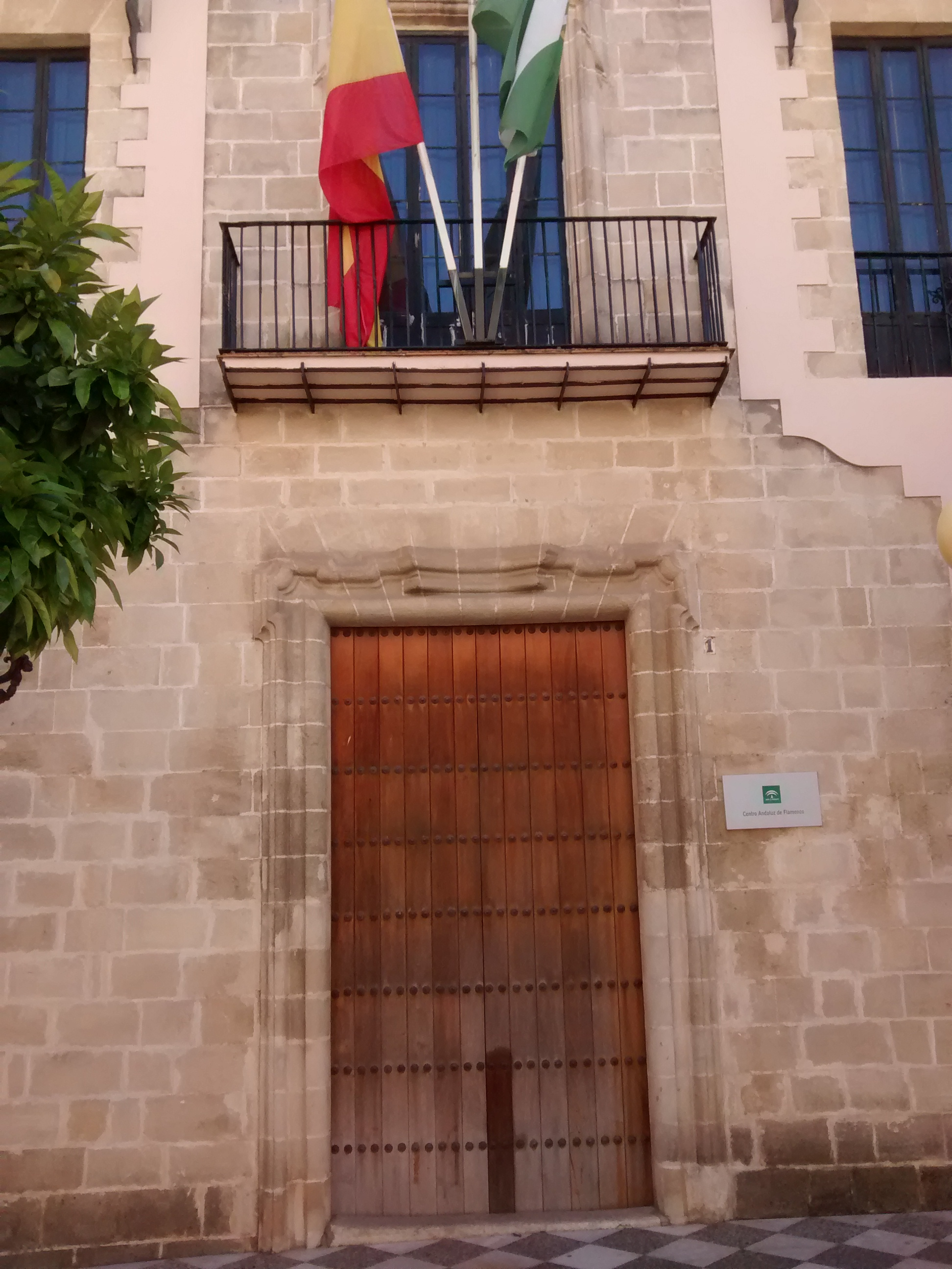 Andalusian Centre of Flamenco in Jerez de la Frontera.